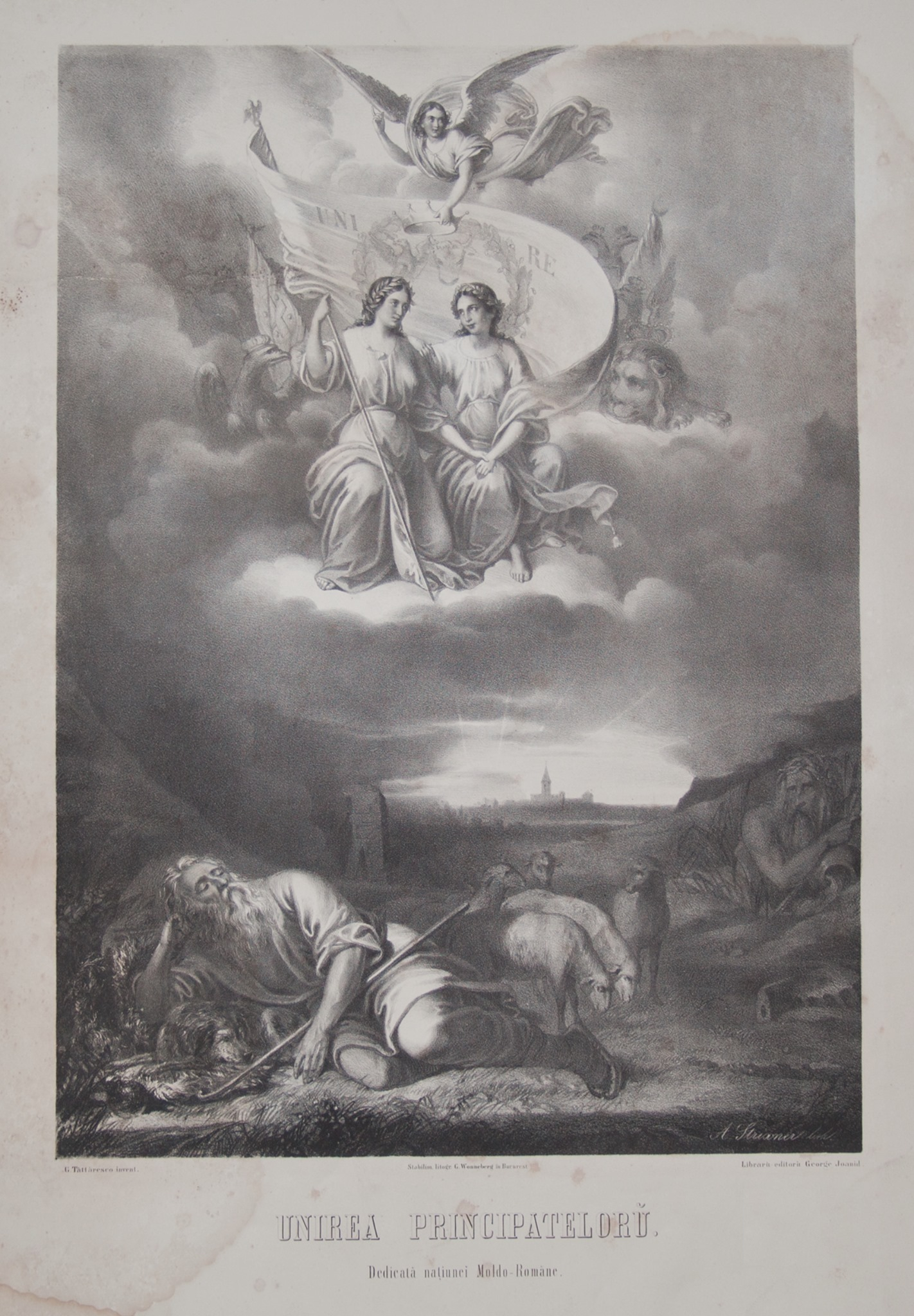 Gheorghe Tattarescu - Unirea Principatelor